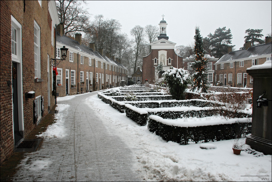 Begijnhofje Breda December 2010